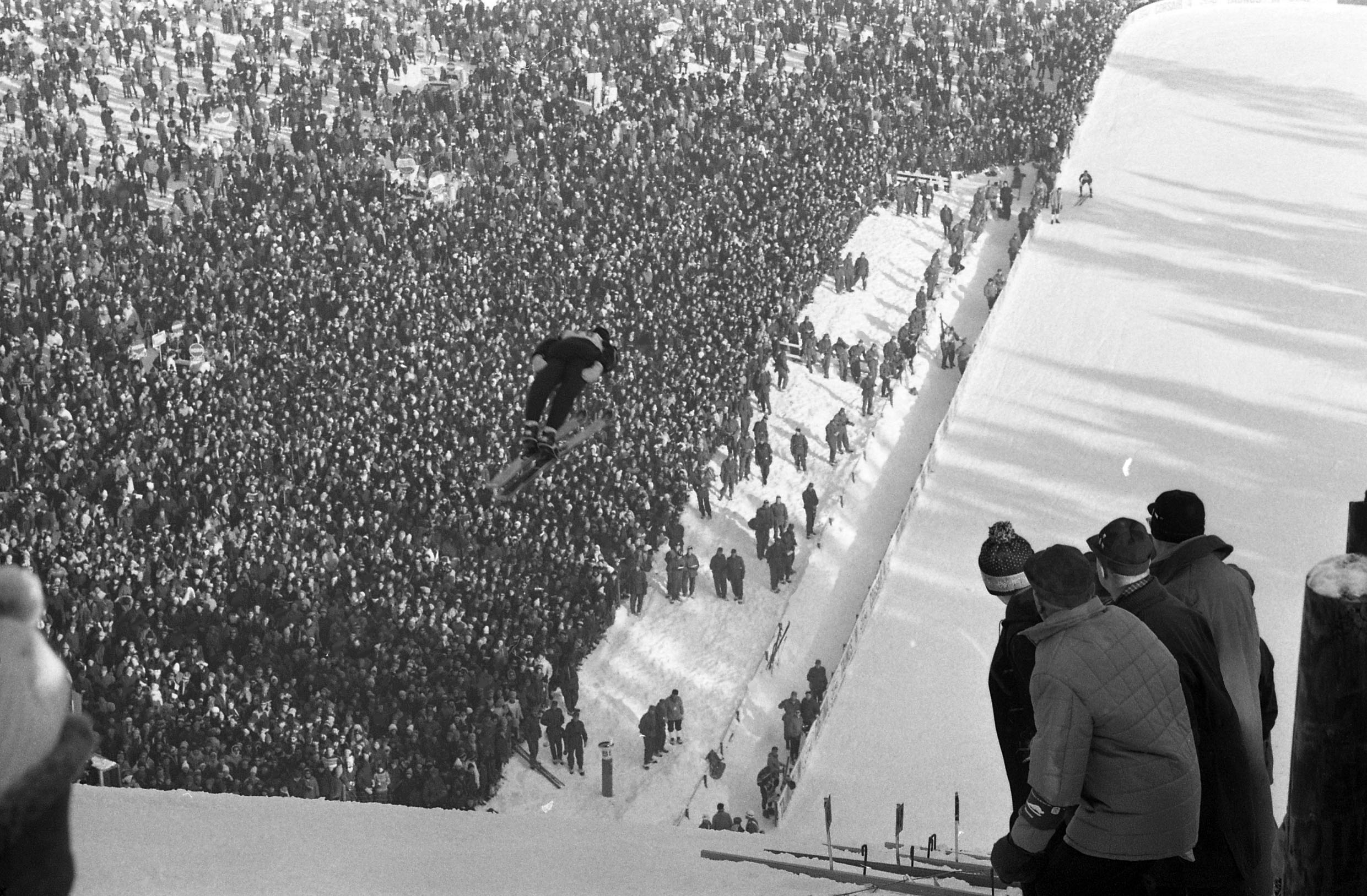 Beskrivelse: Hopp ut i folkehavet Sted: Oslo År: 1966 Fotograf: Billedbladet NÅ/ van Deurs Arkivref.: RIKSARKIVET- RA/PA/0797/U/Ua/3906_3_23